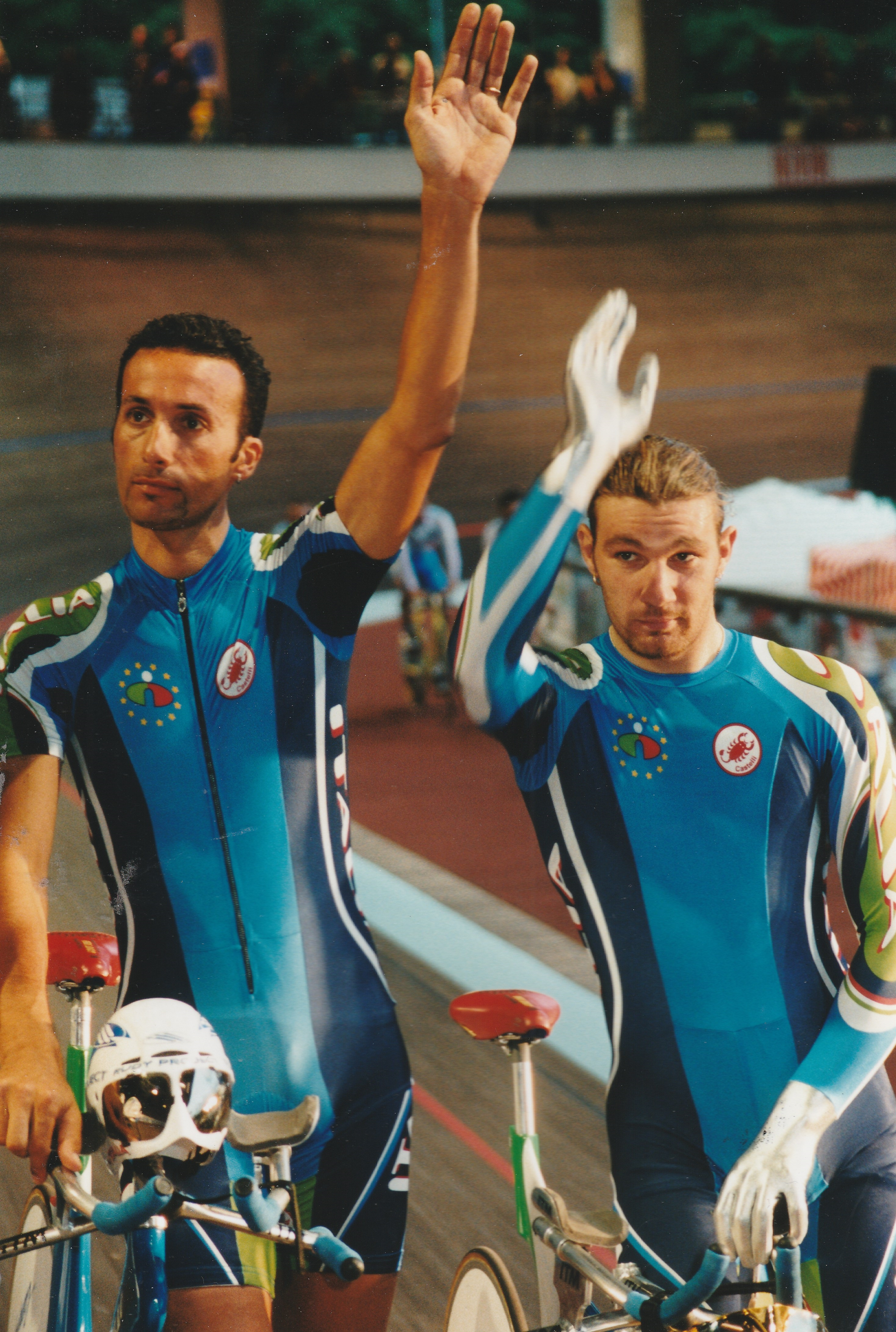 Andrea Collinelli (l.), Mauro Trentini bei der Radsportveranstaltung "Die Freitag Nacht"